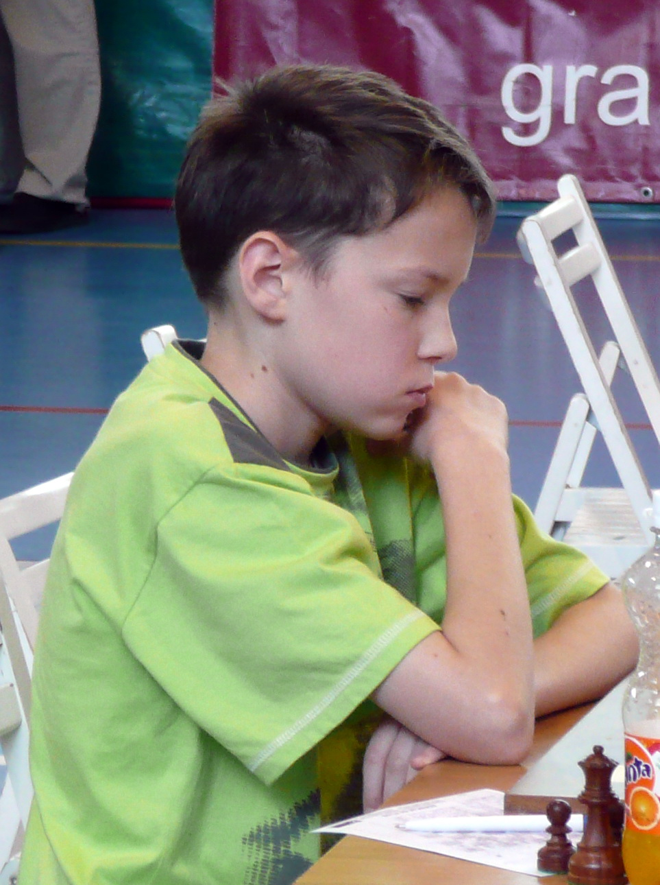 Kamil Dragun, Gorzów Wielkopolski 2008.